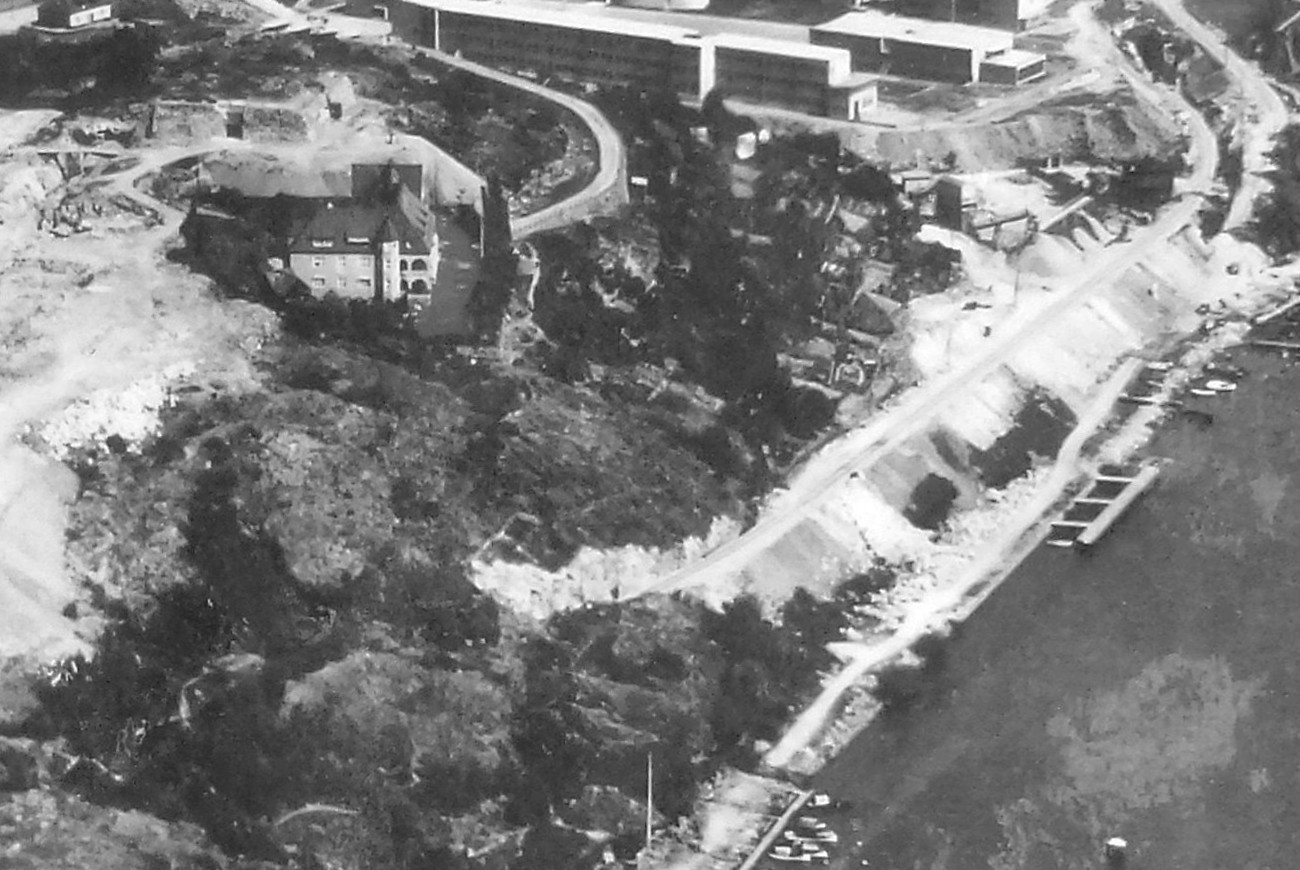 Årstalundens järnvägsspår 1938, till vänster syns Sachsska barnsjukhuset